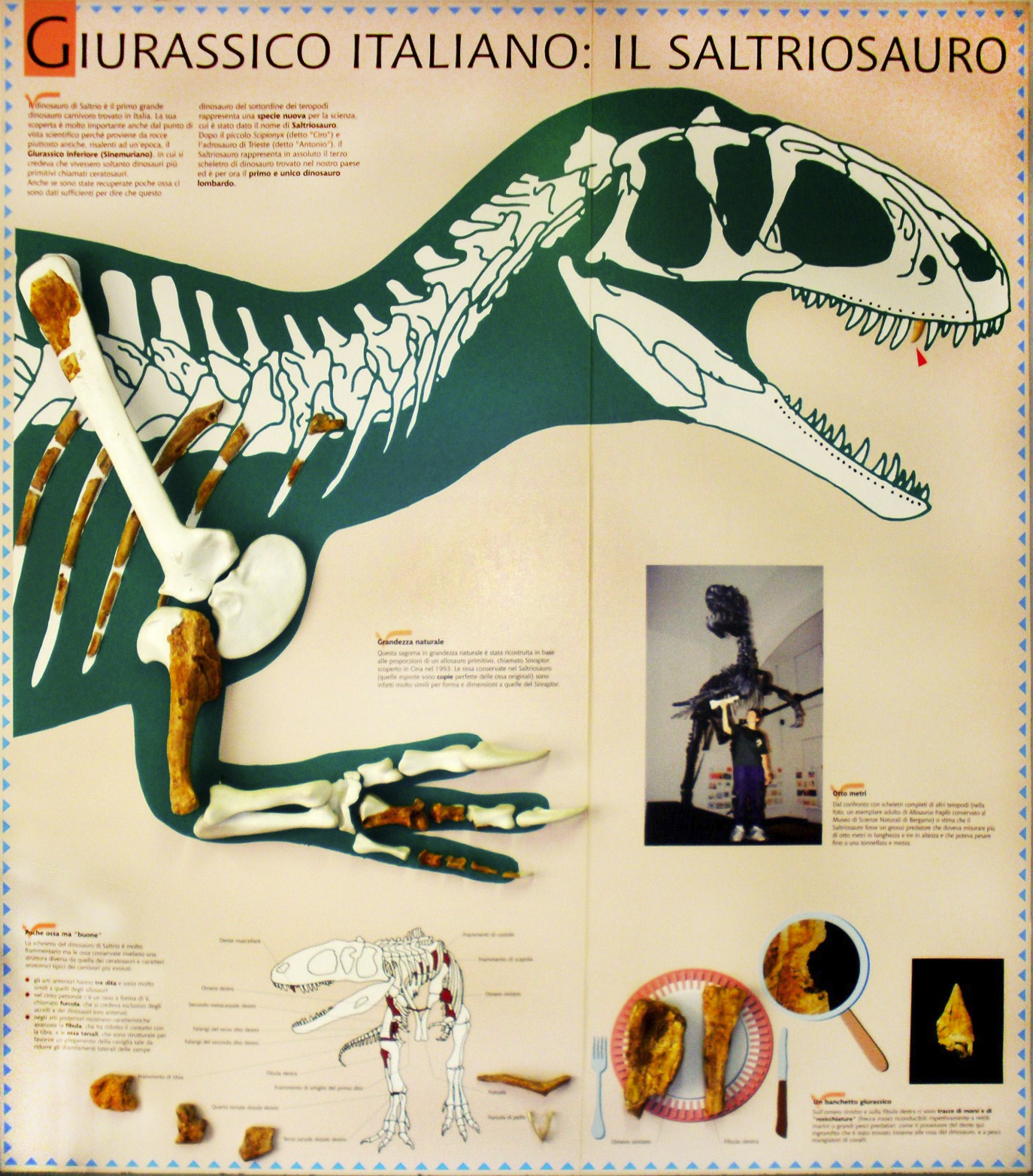 Silhouette of a primitive dinosaur called Sinraptor, with copies of the original "Saltriosaurus" fossil bones - Took the photo at Museo dei Fossili di Besano